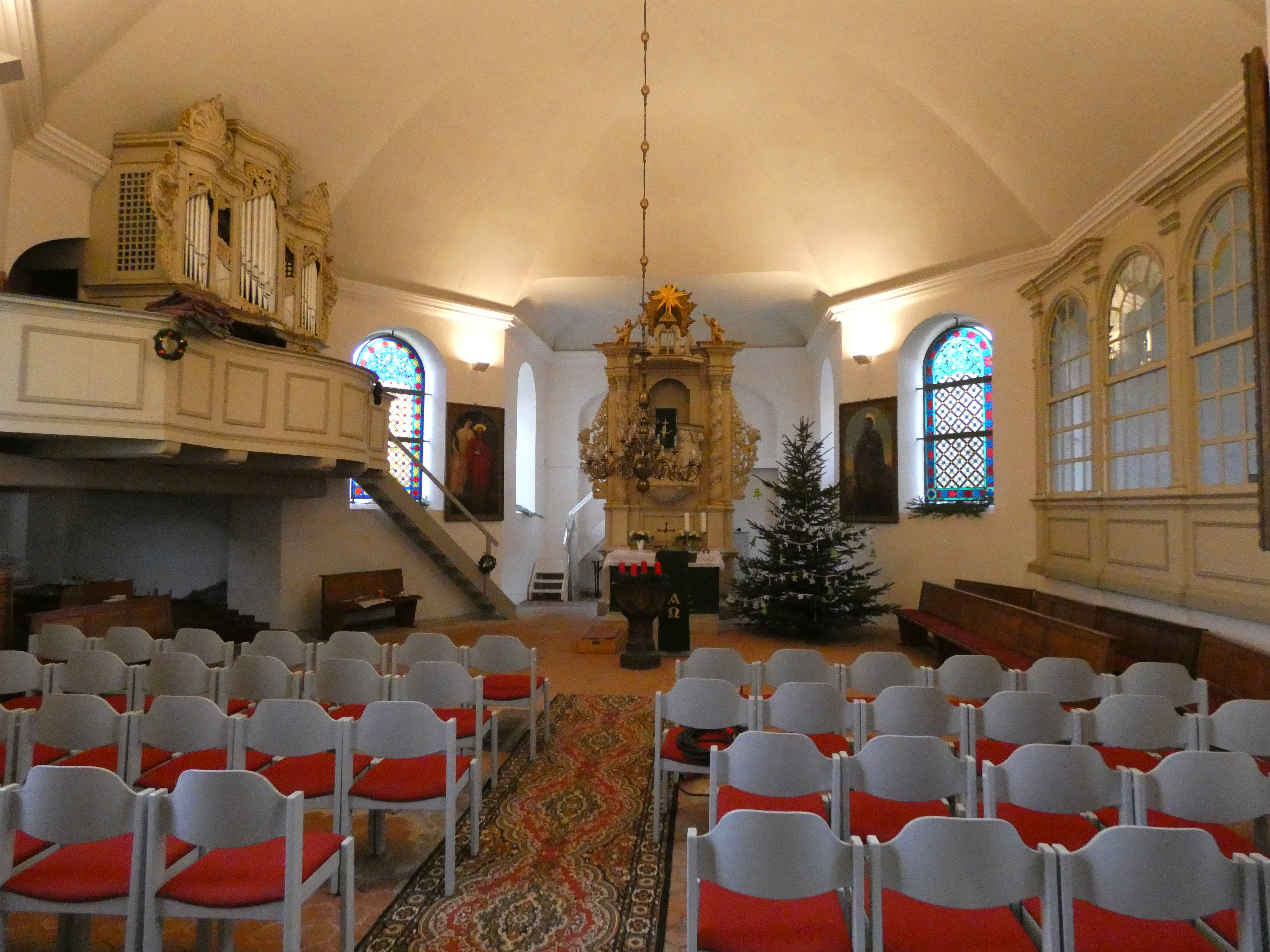 Kirche Roskow innen